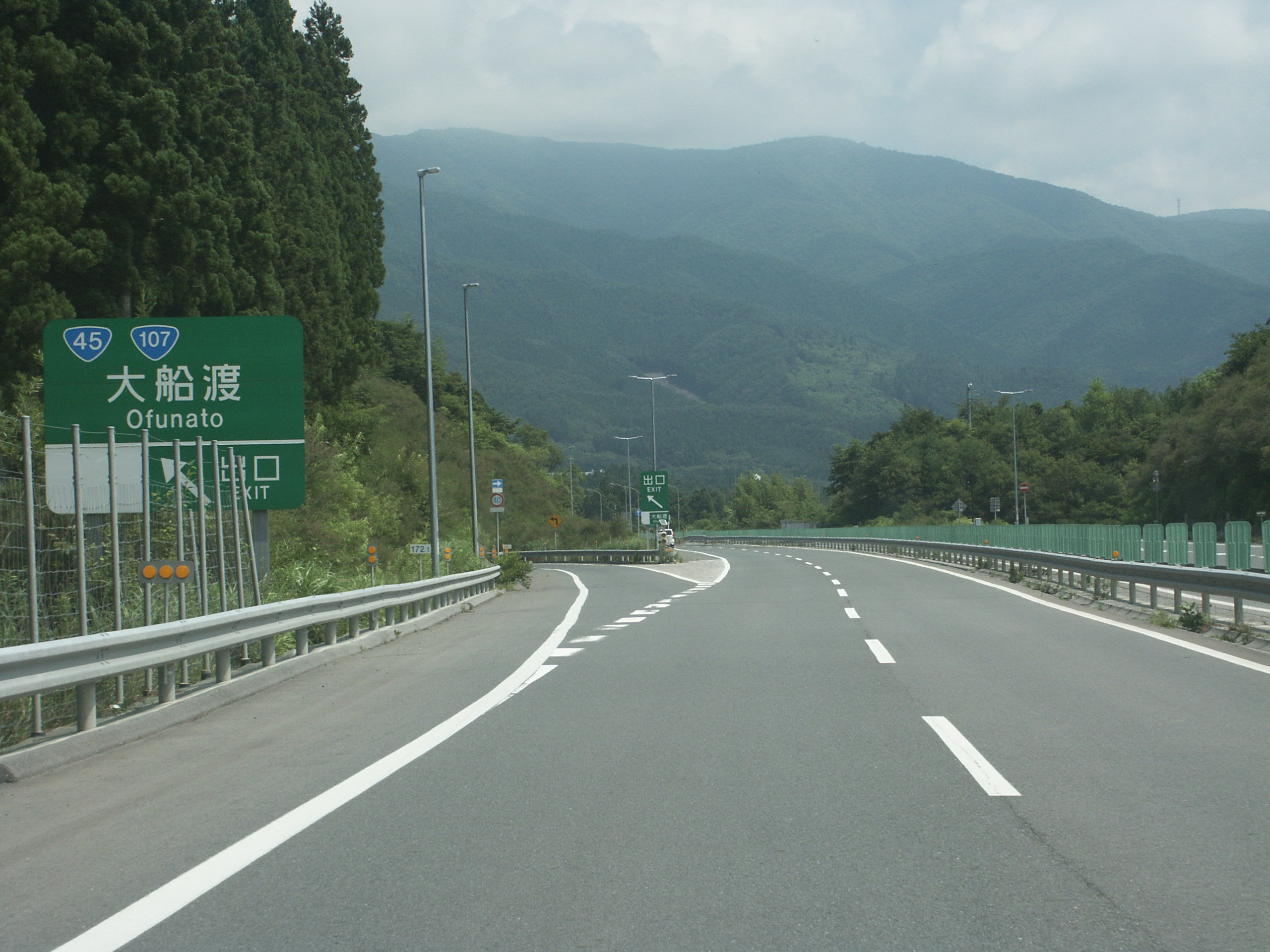 三陸自動車道（大船渡三陸道路）大船渡IC出口（陸前高田IC方面側）